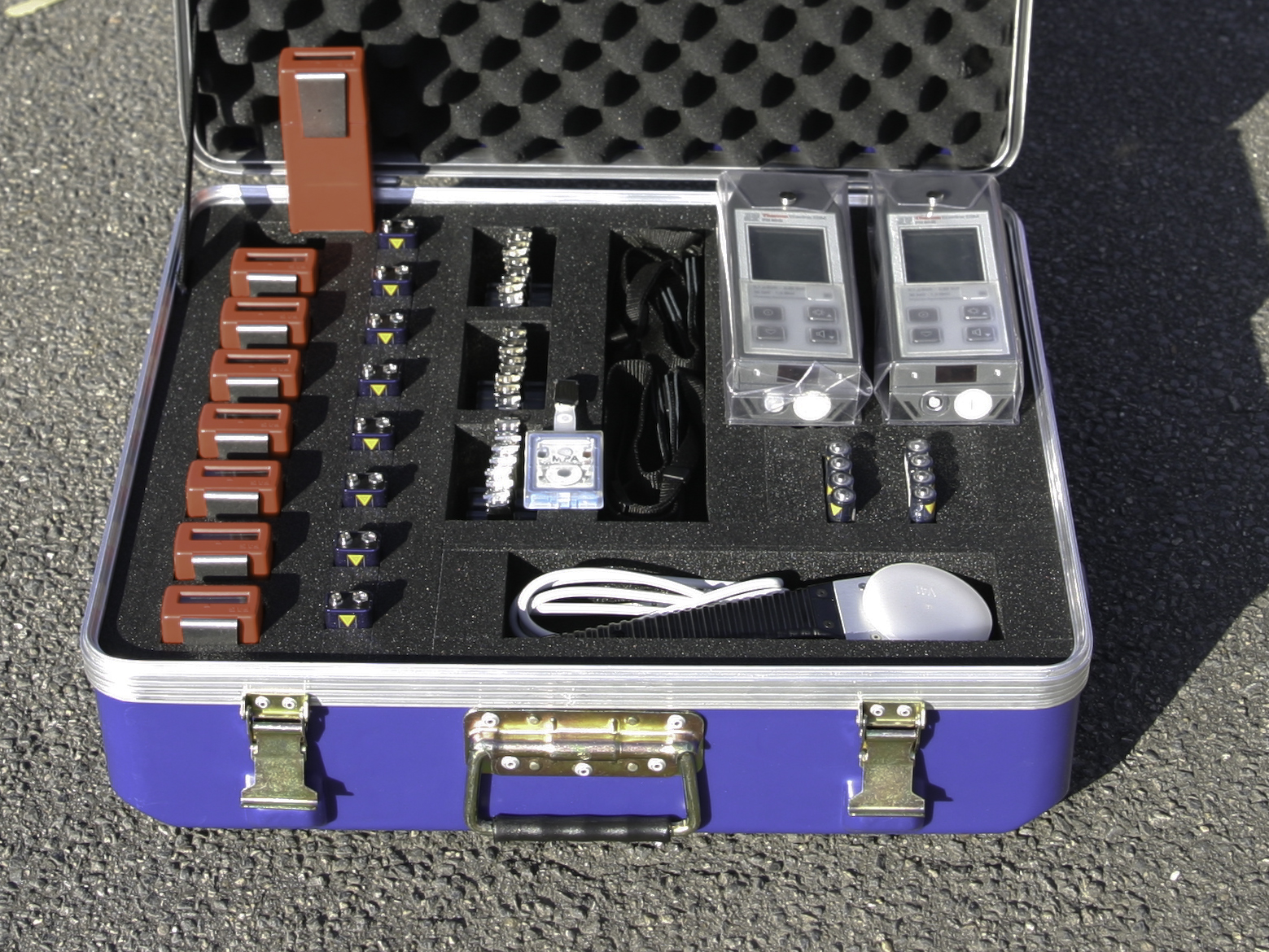 Ein Transportkoffer der SEB-ABC mit Dosis- und Dosisleistungsmessern für Kernstrahlung